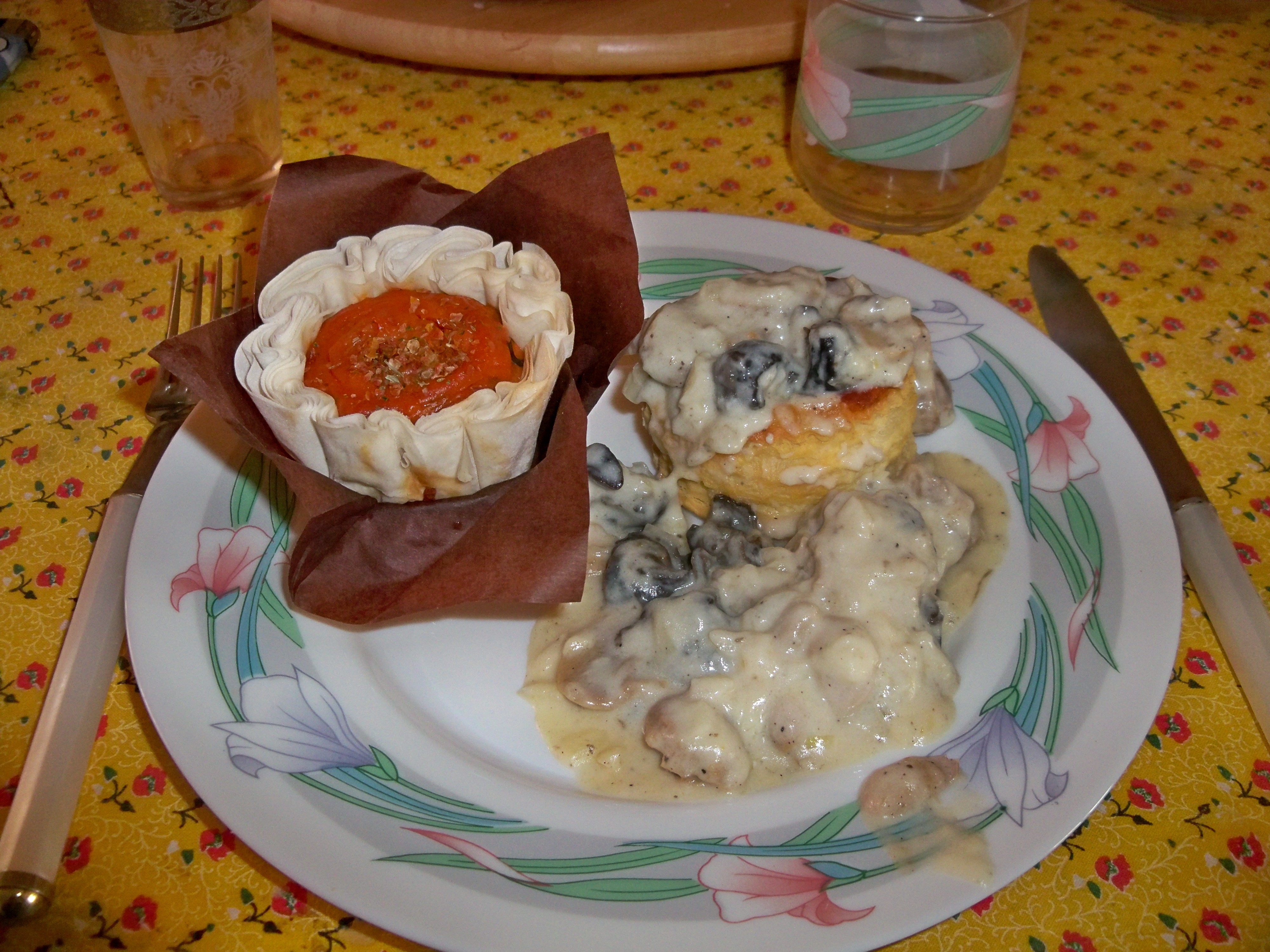 escargots sauce au Riesling